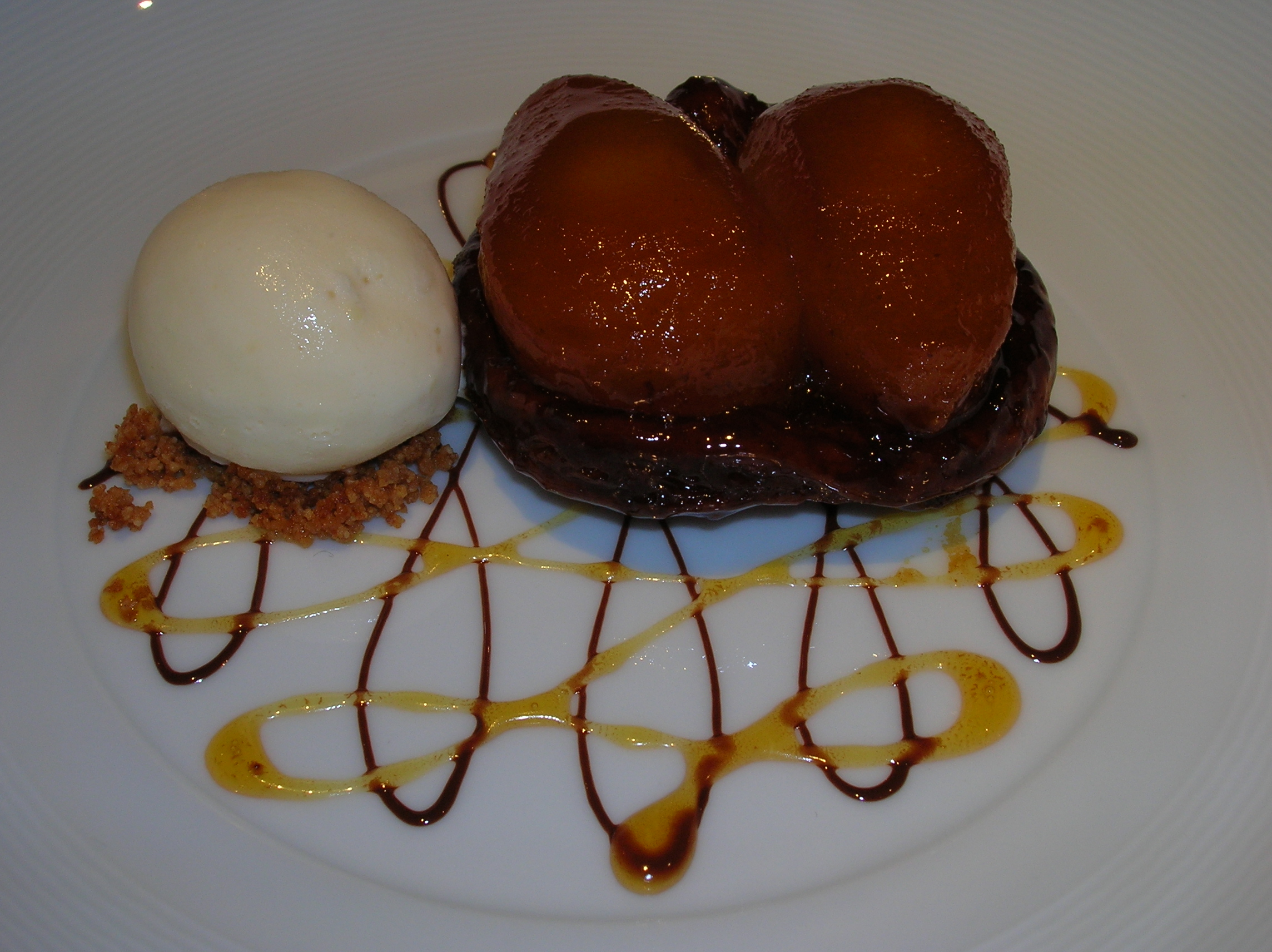 טארט טטין של גורדון רמזי